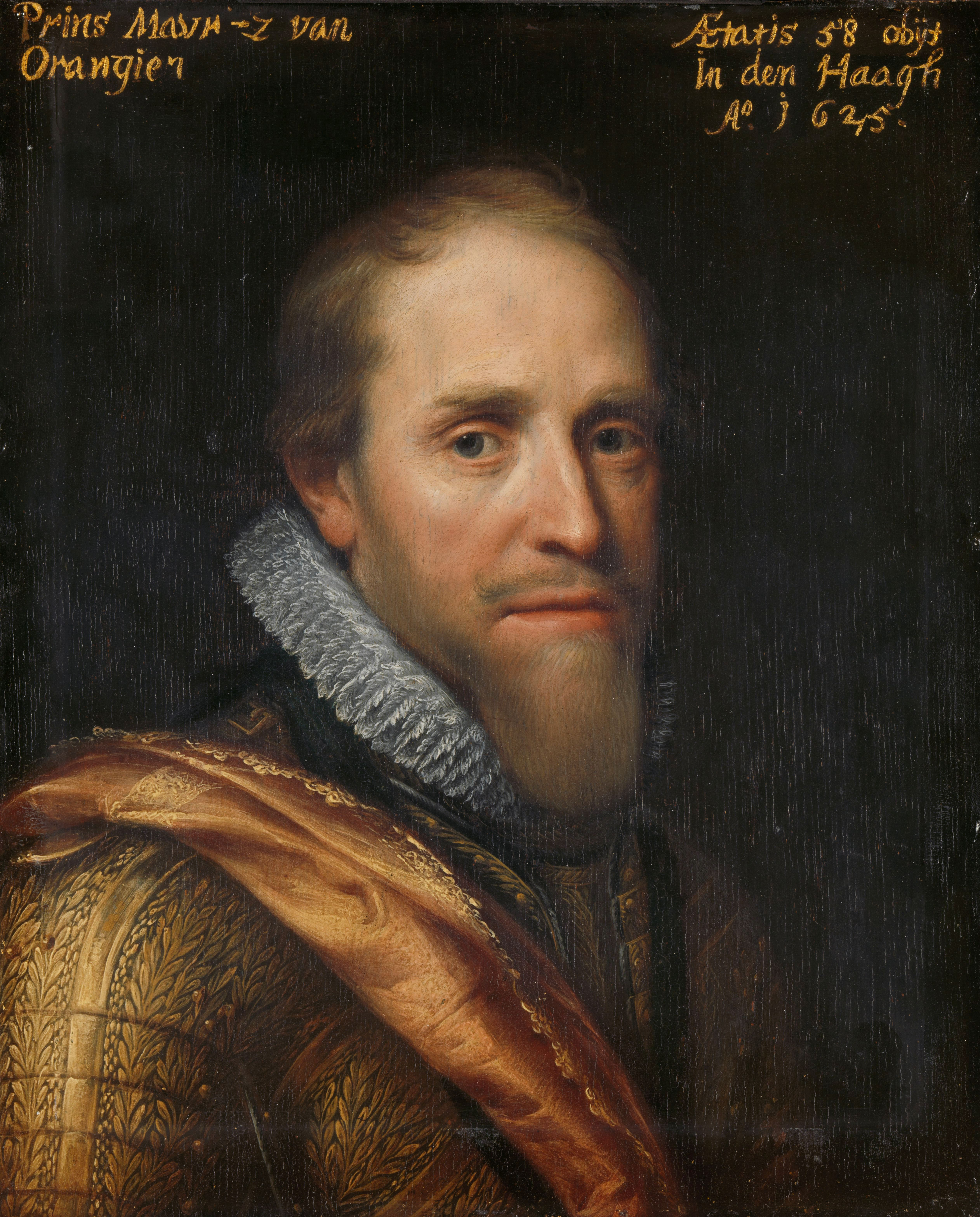 Portret van Maurits (1567-1625), prins van Oranje. Buste naar rechts, in wapenrusting. Onderdeel van de reeks portretten afkomstig uit het Stadhouderlijk Hof te Leeuwarden. Collection: schilderijen; Leeuwarden serie